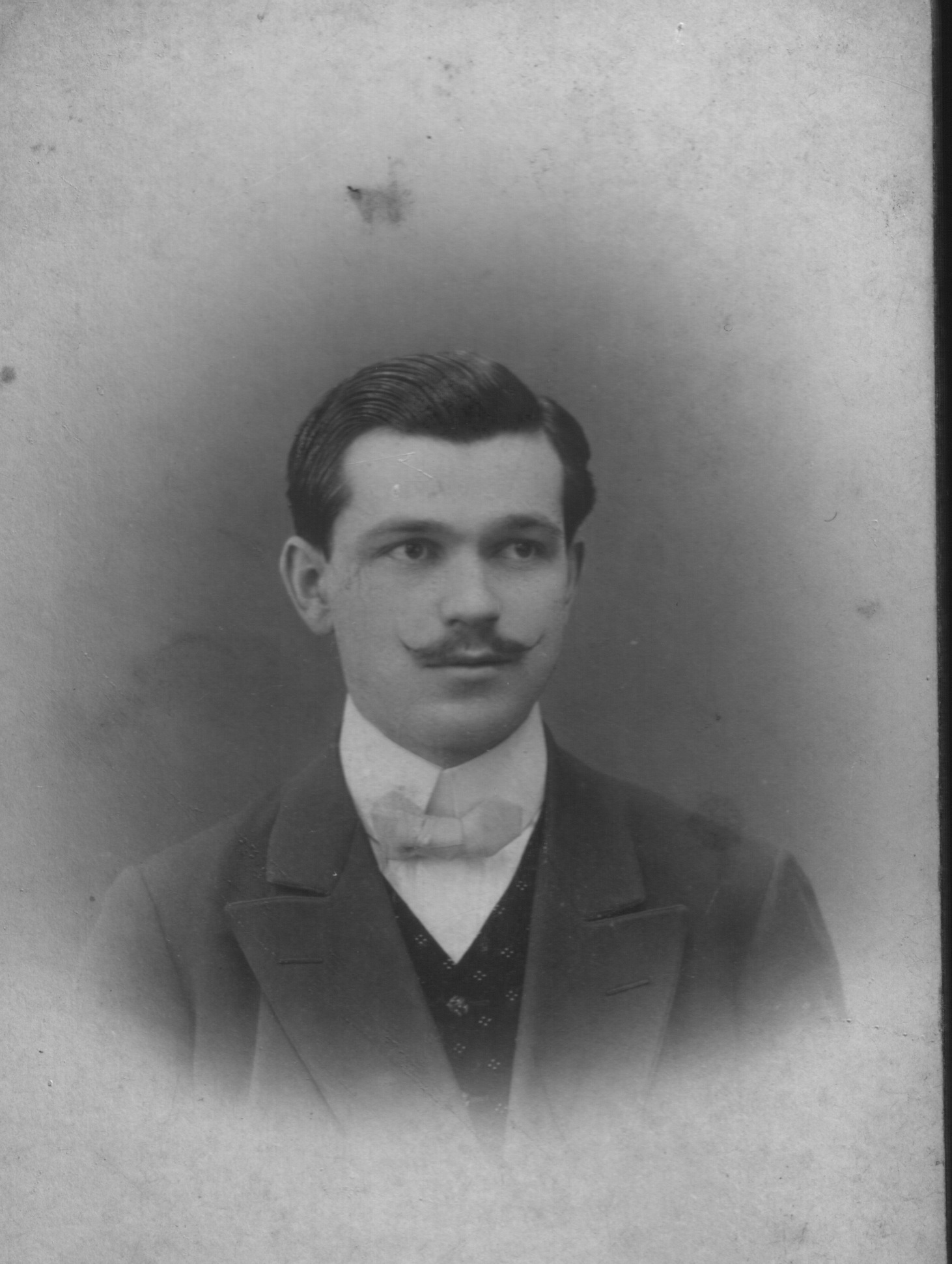 Ядвігін Ш.